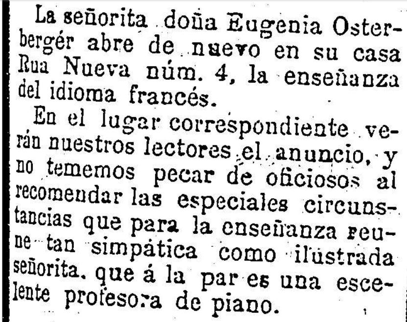 Comentario sobre Eugenia Osterberger no El Diario de Santiago,19-10-1875.